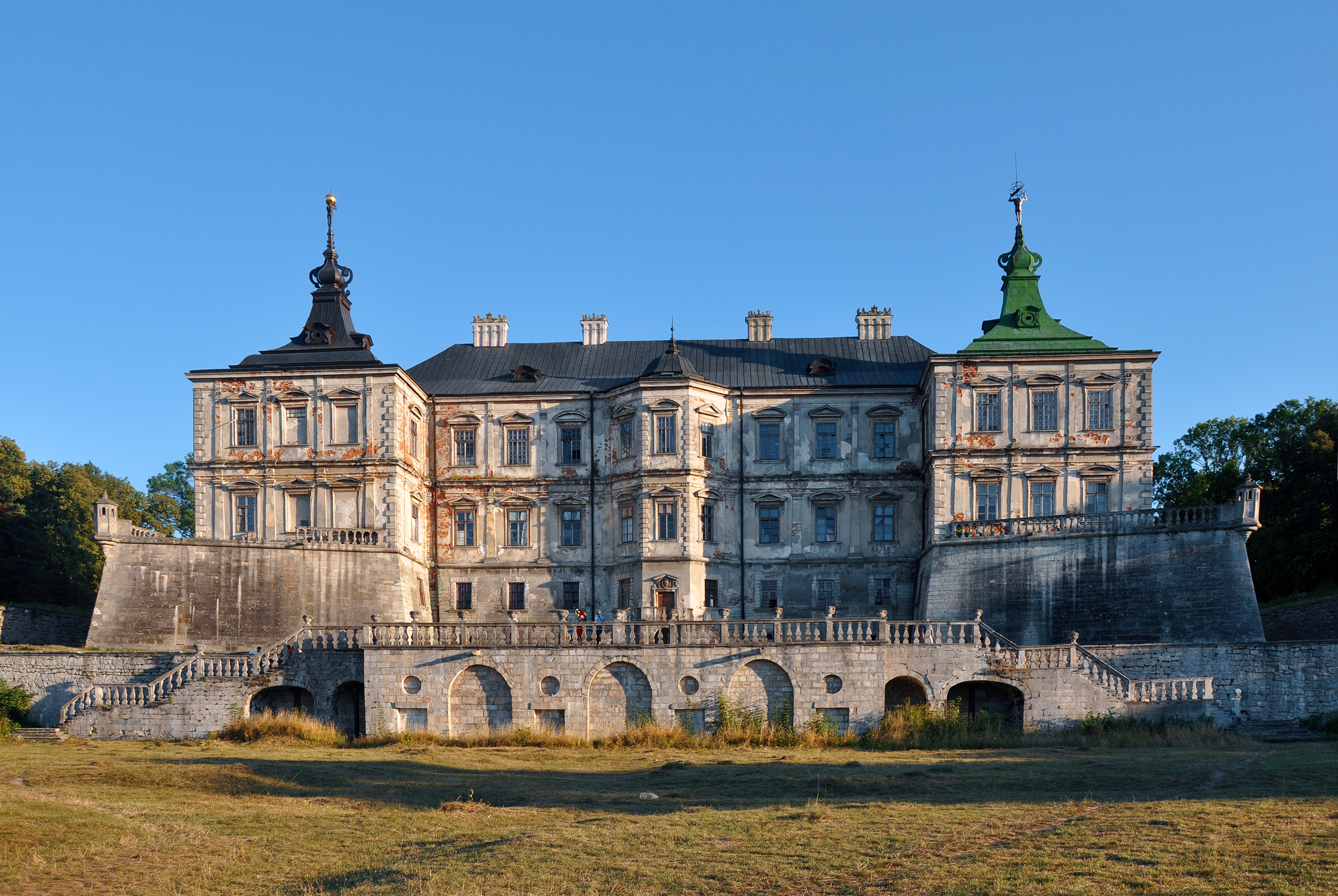 Палац (мур.), Підгірці